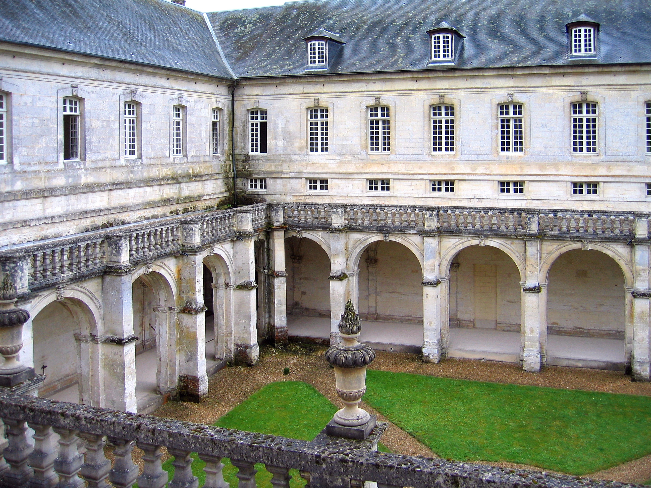 Le cloître de l'abbaye du bec-Hellouin